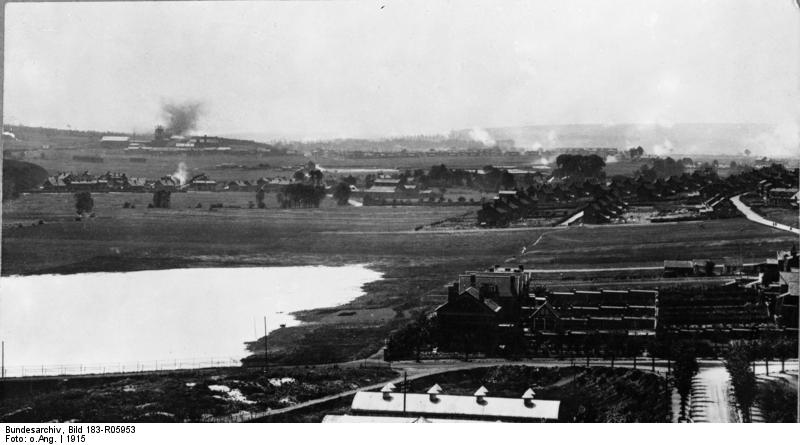 Frankreich, Lorettohöhe, Artilleriebeschuss Westfront, Loretto Höhe Beginn des Trommelfeuers - 1915 Information added by Wikimedia users.